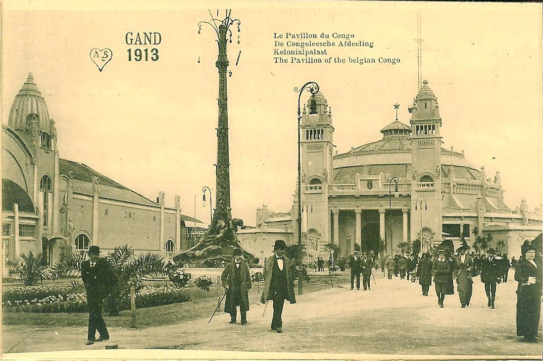 Photographie de l'exposition universelle de Gand, en 1913.